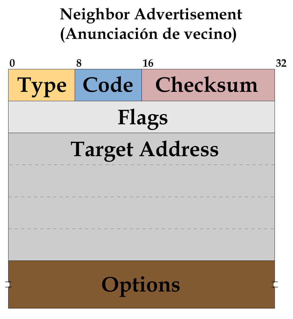 Formato de mensaje ICMPv6 Neighbor Advertisement